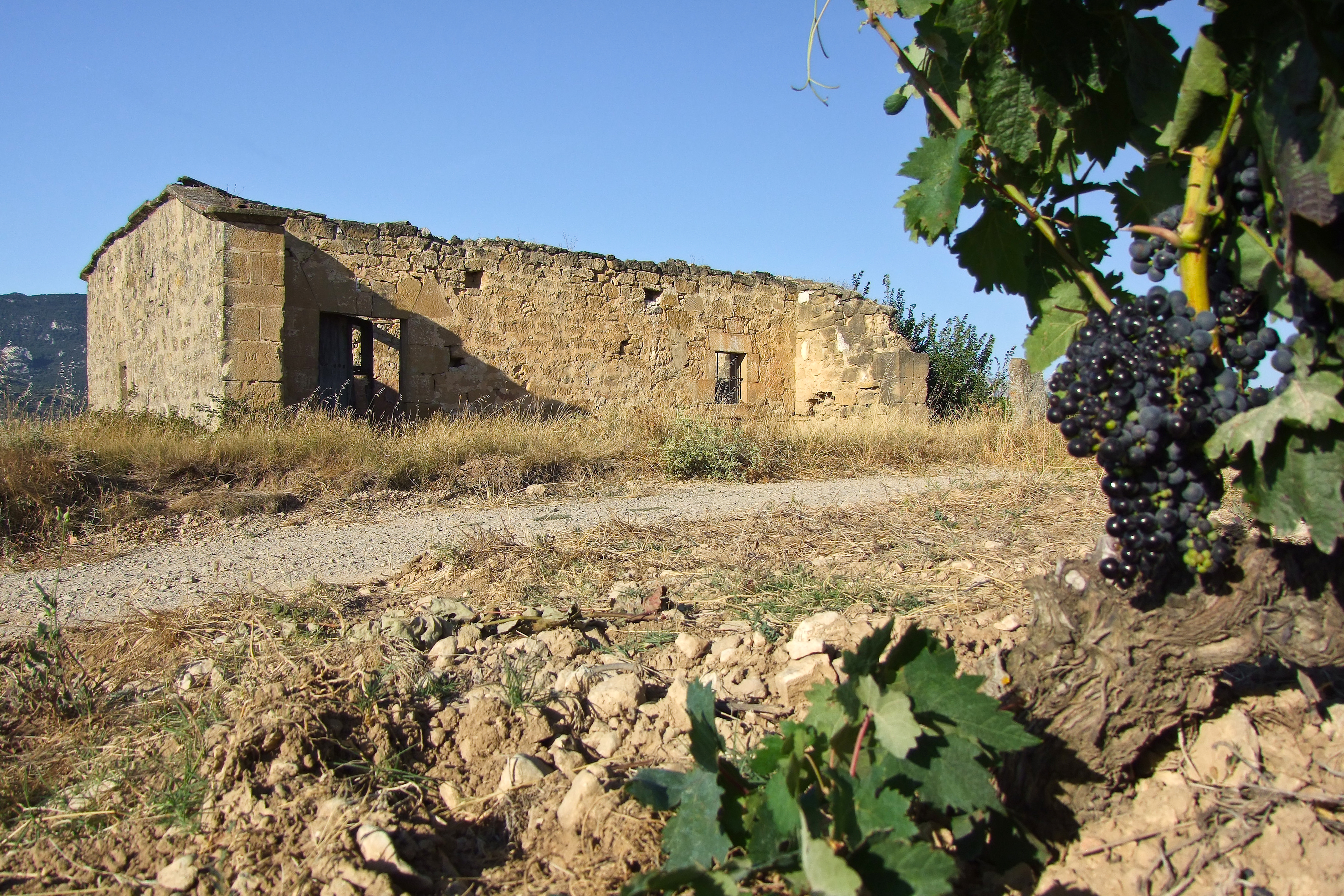 Ermita de San Roque en la localidad de Ábalos, La Rioja - España